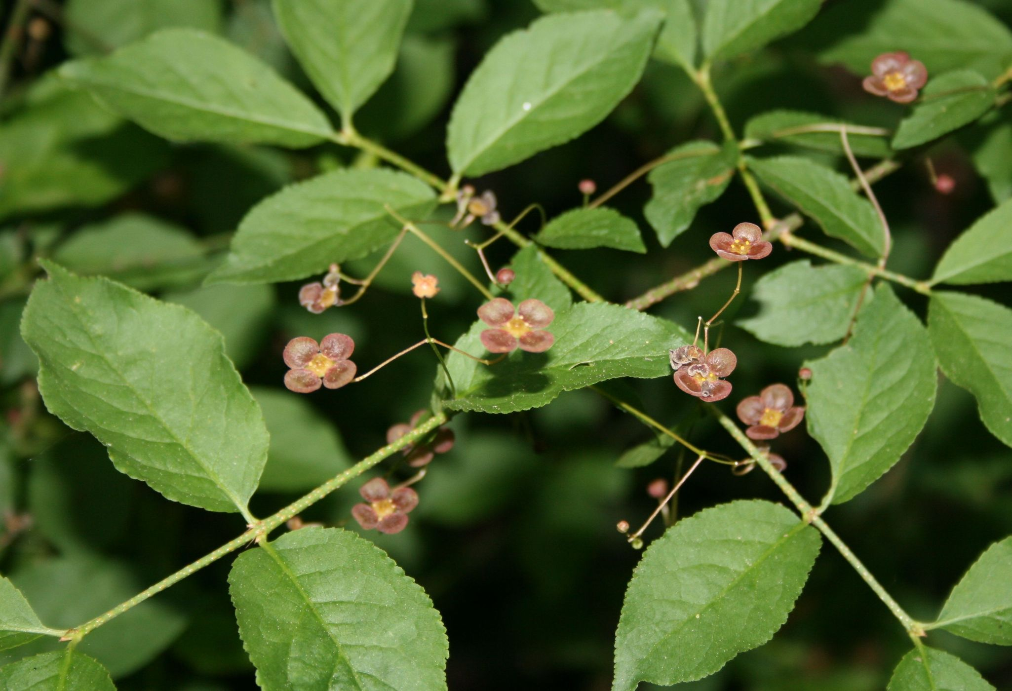 Warzen-Spindelstrauch (Euonymus verrucosa), Baumwürgergewächse (Celastraceae) - Österreich/Austria/Autriche: Wien, Schönbrunn